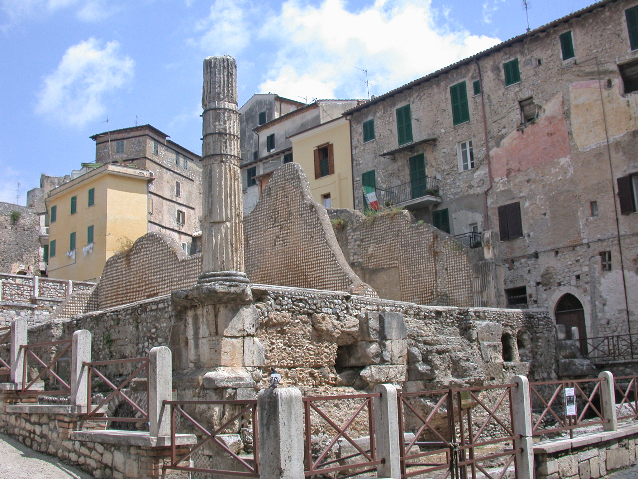 Terracina (provincia di Latina, Lazio, Italia), città alta, resti del Capitolium romano.